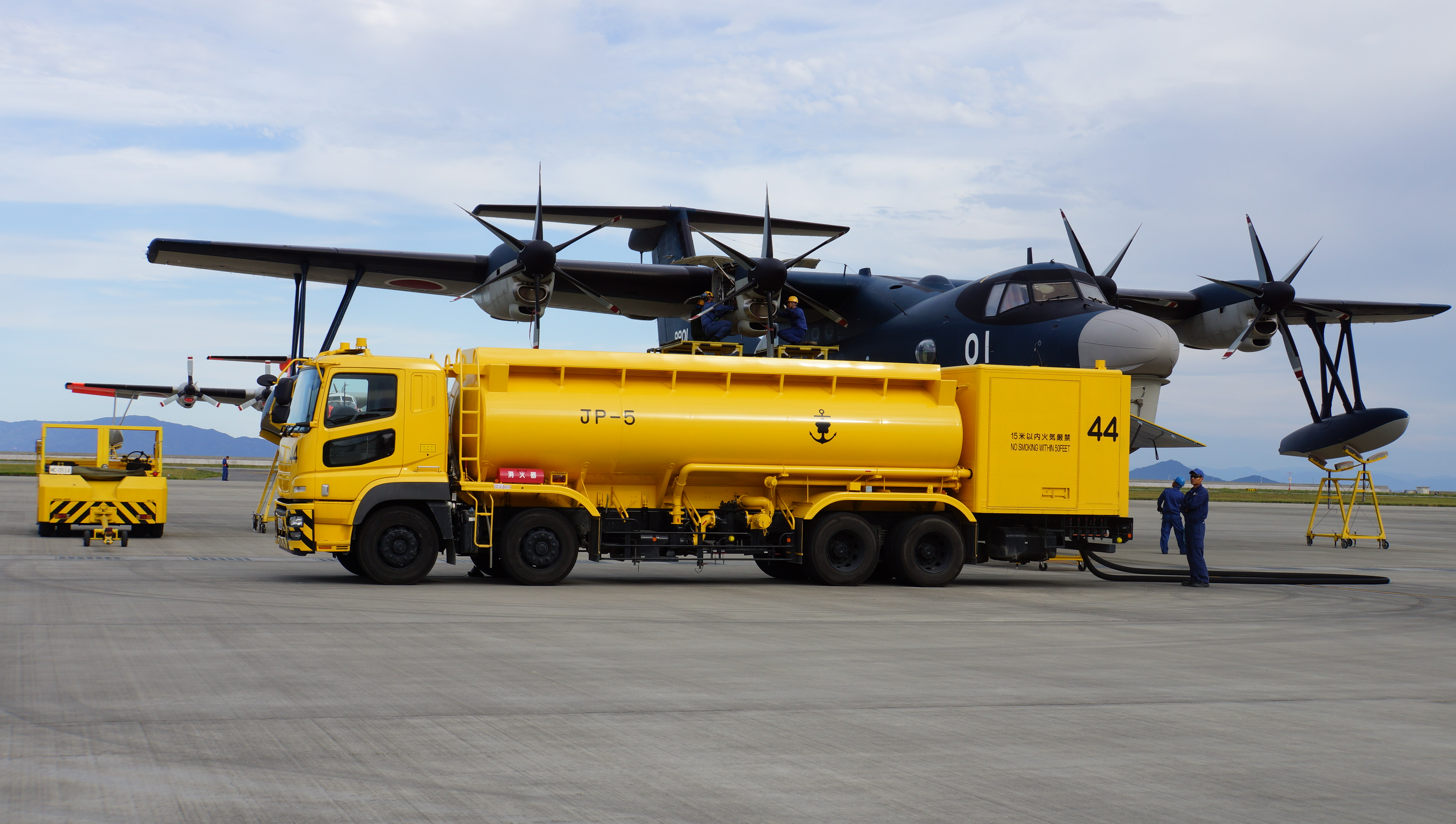 海上自衛隊 20000ℓ燃料給油車（三菱ふそう スーパーグレート）及びUS-2。 14年9月14日 岩国航空基地にて。